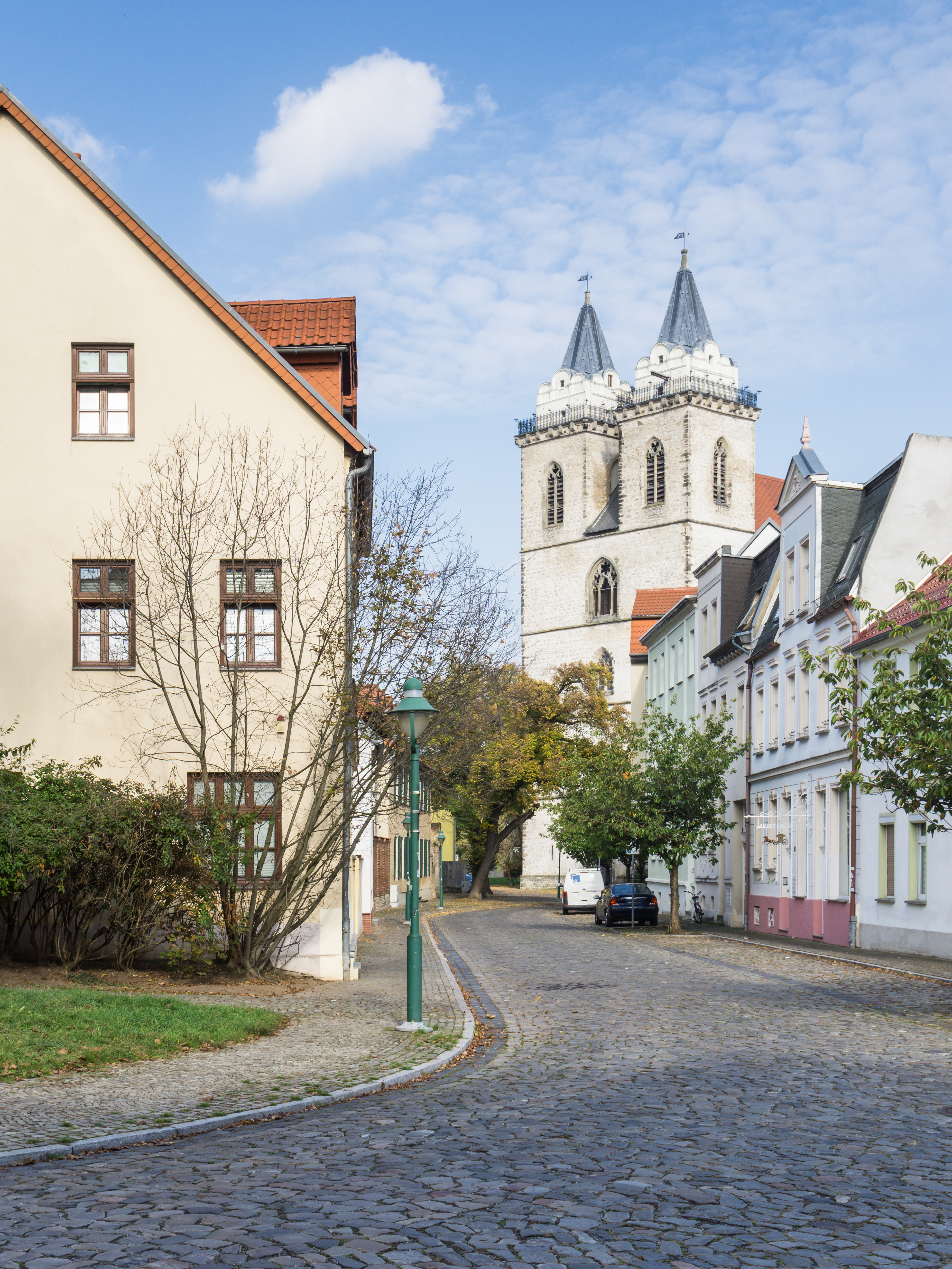 St. Johannes Kirchstraße 29 in Schönebeck OT Bad Salzelmen